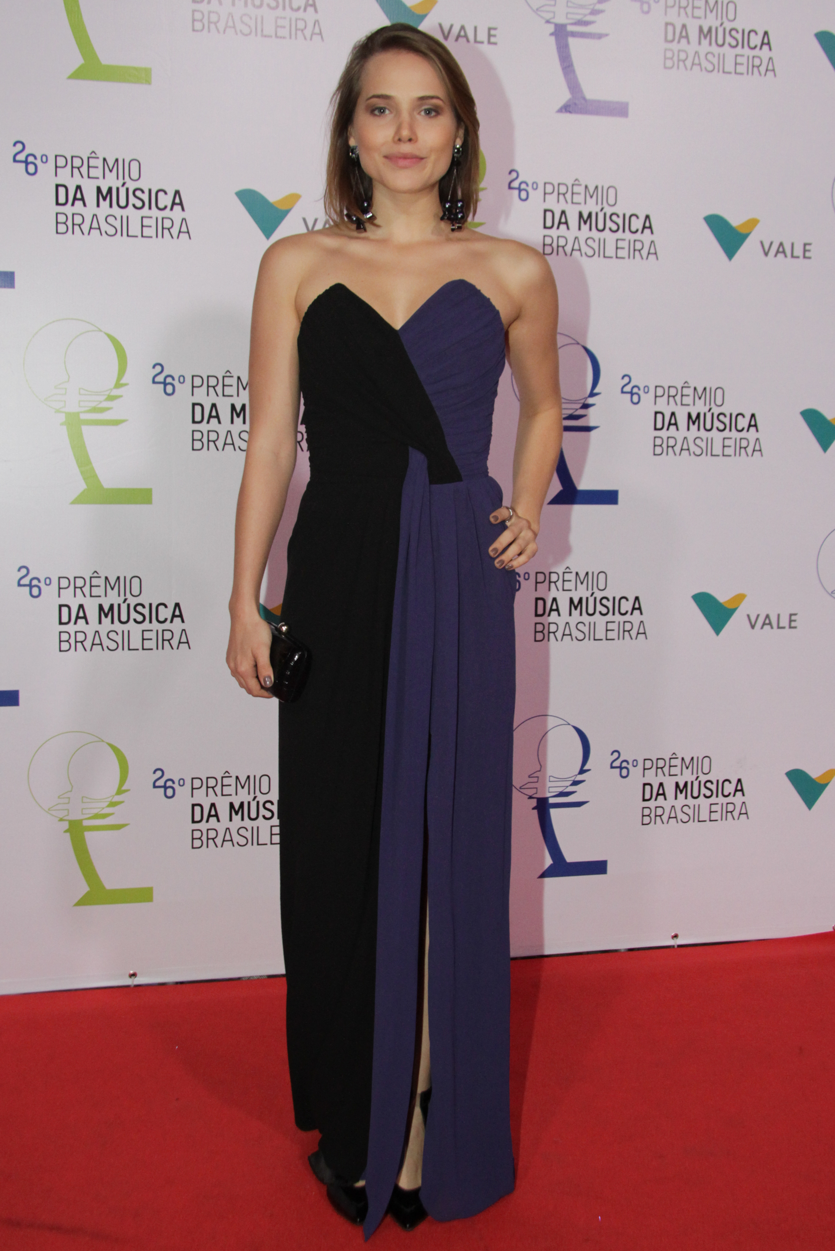 Letícia Colin - 26° Prêmio da Música Brasileira 2015, no Theatro Municipal, no Centro do Rio de Janeiro/RJ. (10/06/15) Foto: Roberto Valverde/Divulgacão